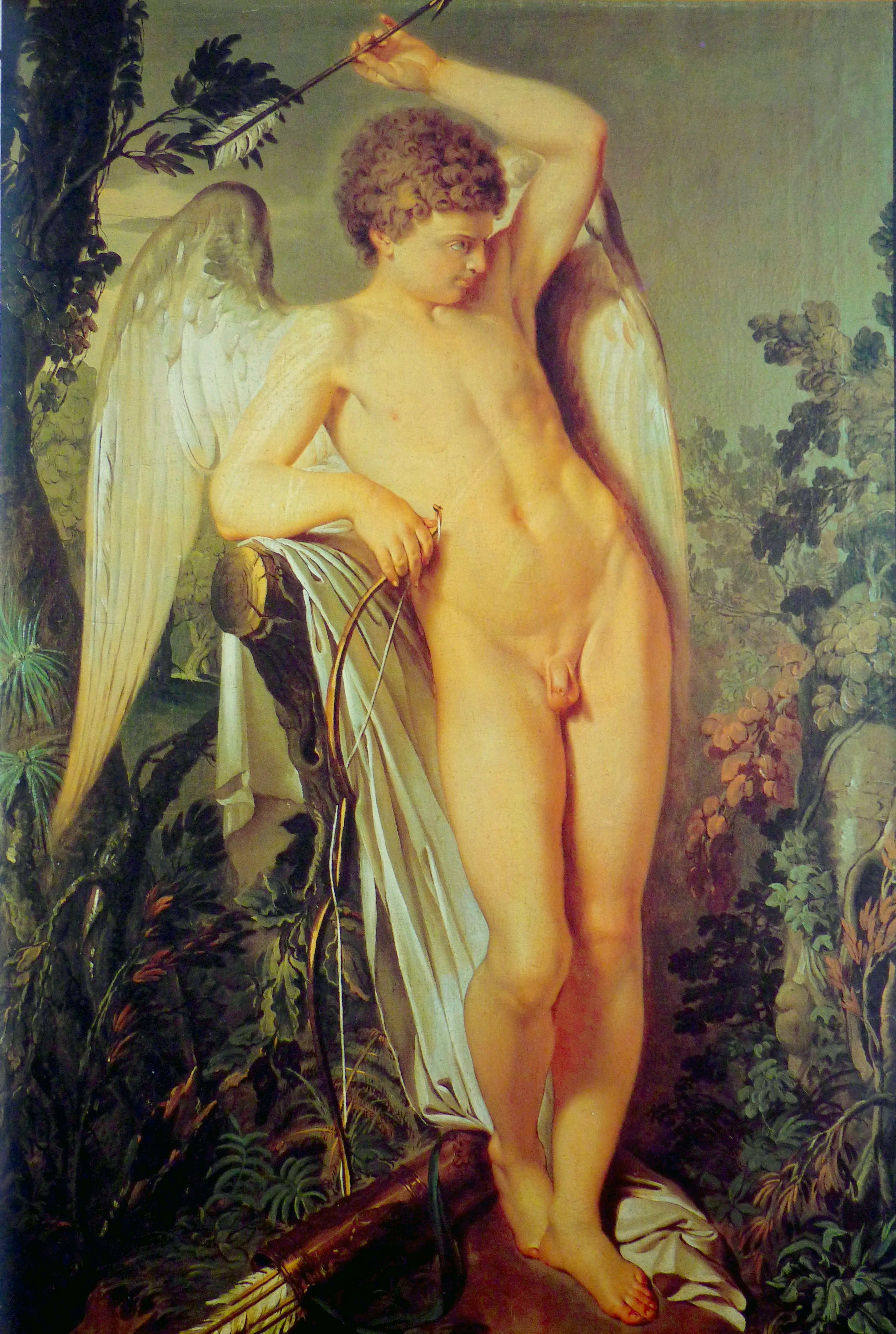 L'Amour debout (1762), Parme, Collection Barbieri - Reproduit dans le revue FMR n°63, août 1996.